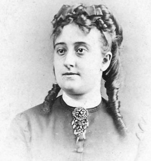 "Album de portraits cartes de visite ayant appartenu à Édouard Manet", Date d'édition : 1860-1883, Format : 1 album de 193 photogr. pos. sur papier albuminé, d'après des négatifs sur verre au collodion ; 31 x 24 cm (vol.), Source : Bibliothèque nationale de France, département Estampes et photographie, 4-NA-115